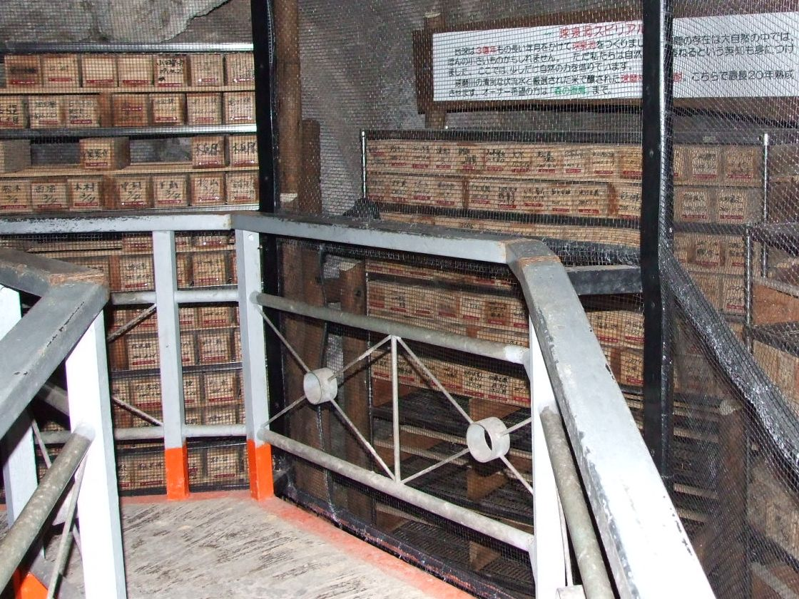 Kyusendo 球泉洞